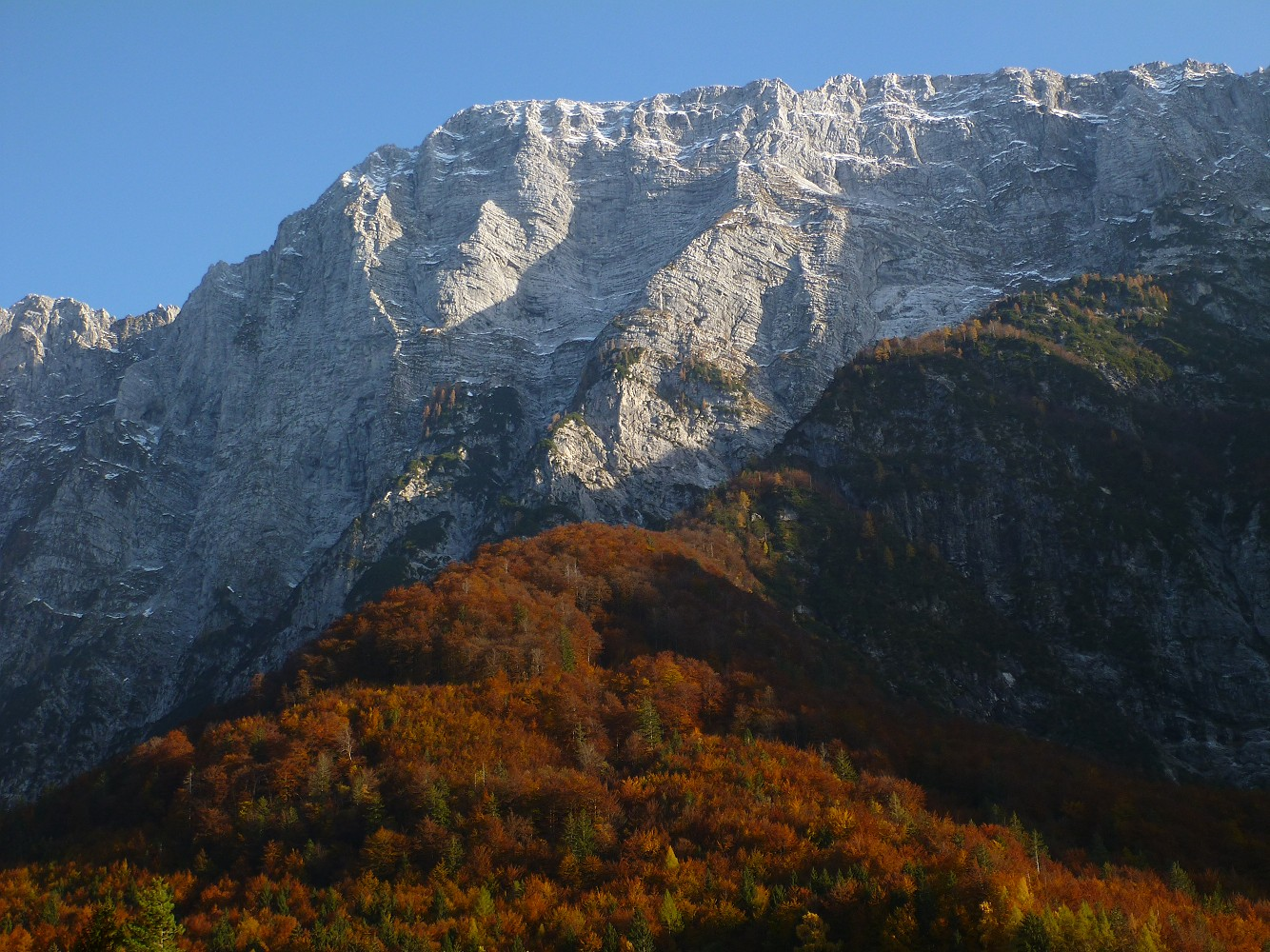 Loška stena